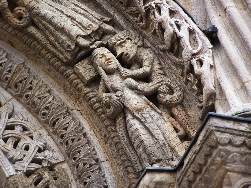 détail.